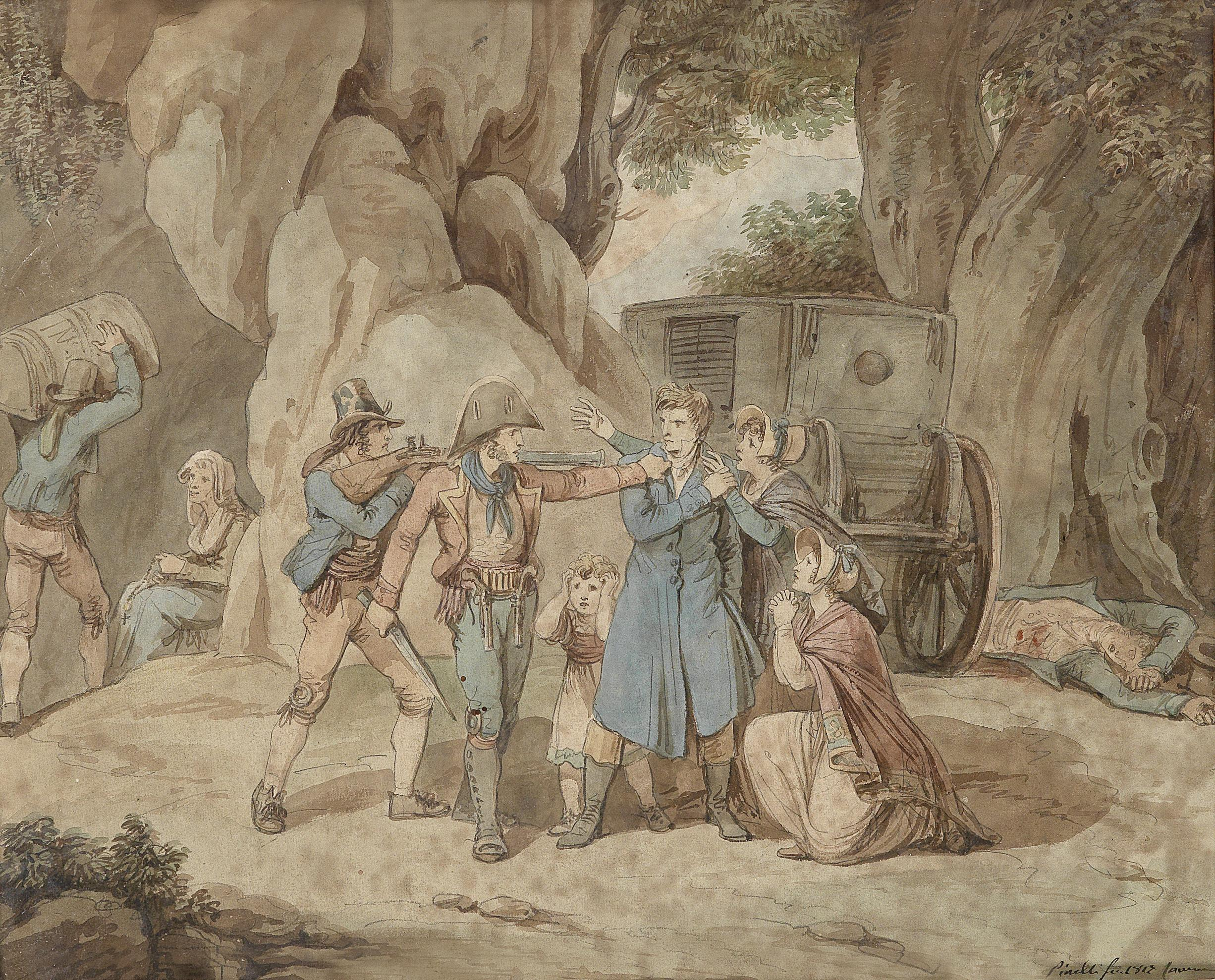 Räuber überfallen eine Familie, signiert und datiert Pinelli fecit 1817, Aquarell auf Papier, 25 x 32 cm